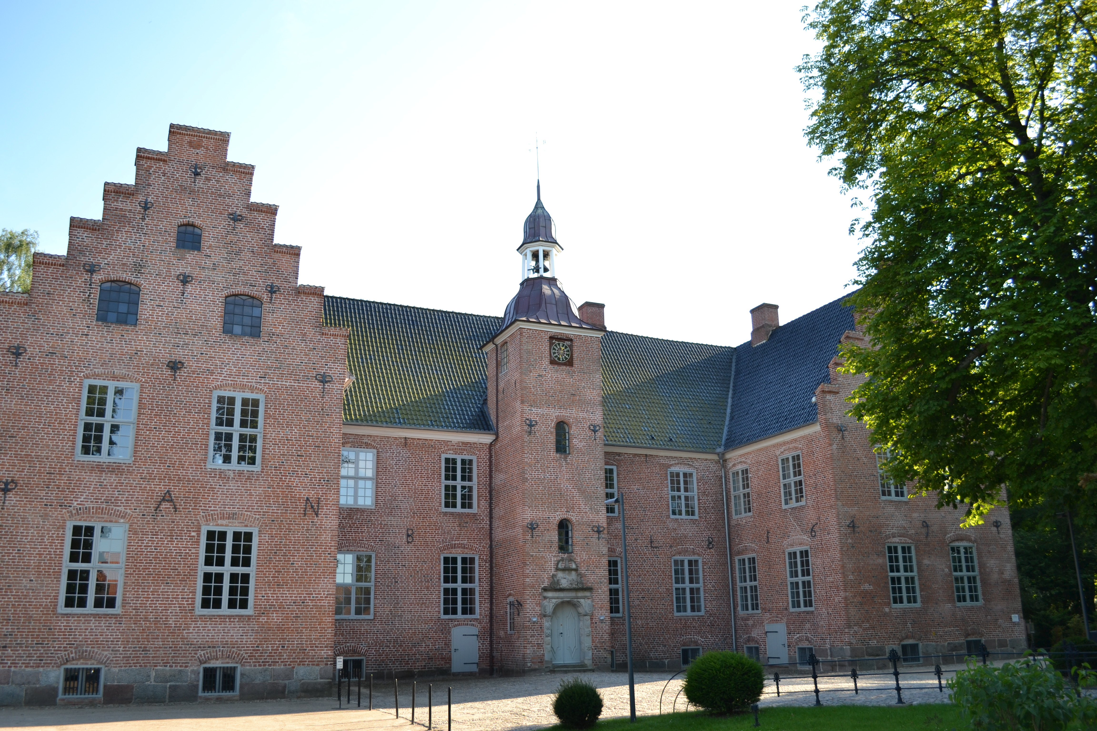 Schloss Hagen in Probsteierhagen